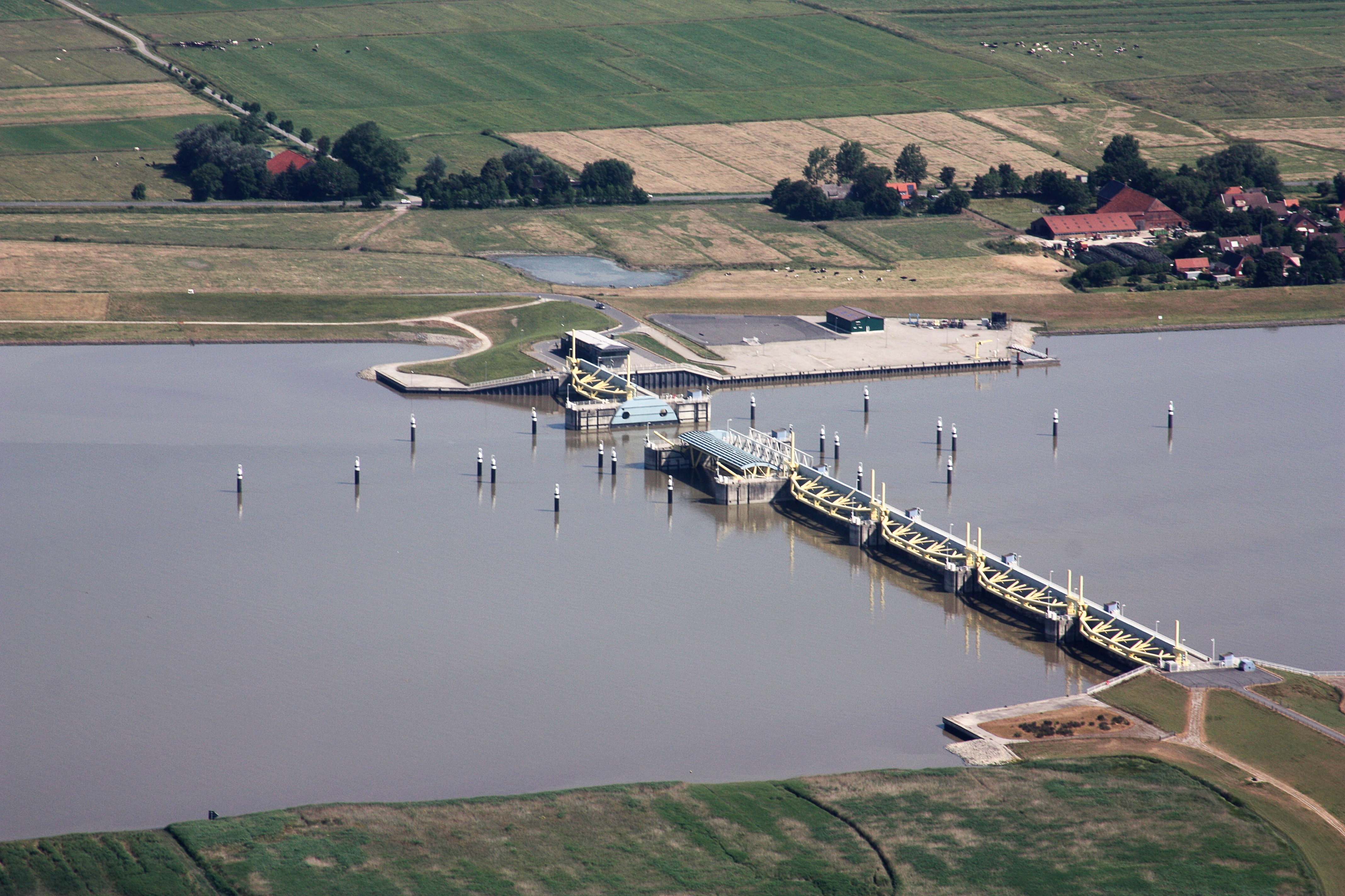 Luftaufnahme; Flug von Leer nach Emden; Flughöhe 1500 ft; Juli 2010; Originalfoto bearbeitet: Tonwertkorrektur und Bild geschärft mit Hochpassfilter